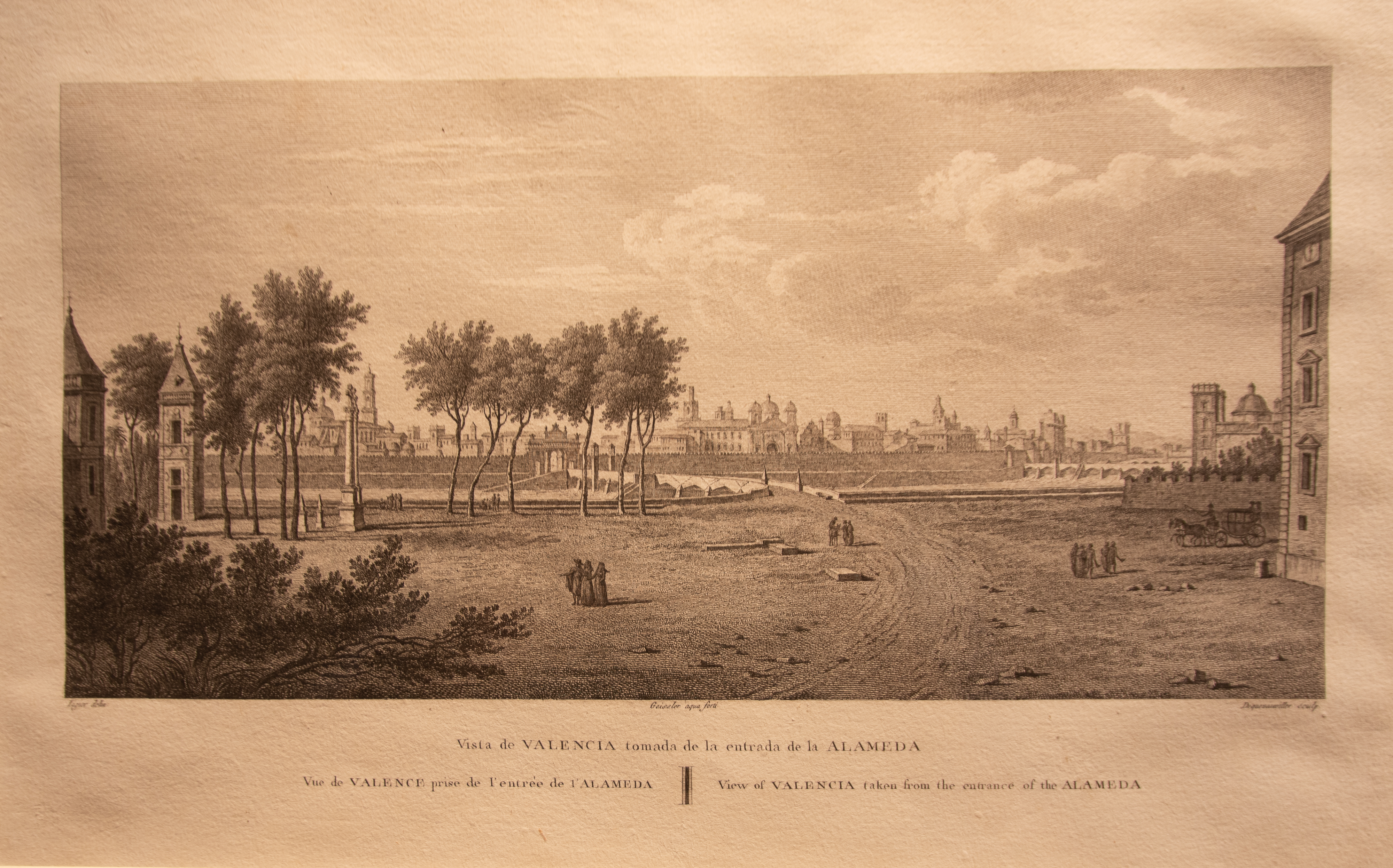 Pla del Real de Valencia hacia 1808. A la derecha se ve el Palacio Real, sede de la antigua capitanía general, que fue mandado demoler en 1811, por el general Joaquín blake por motivos estratégicos